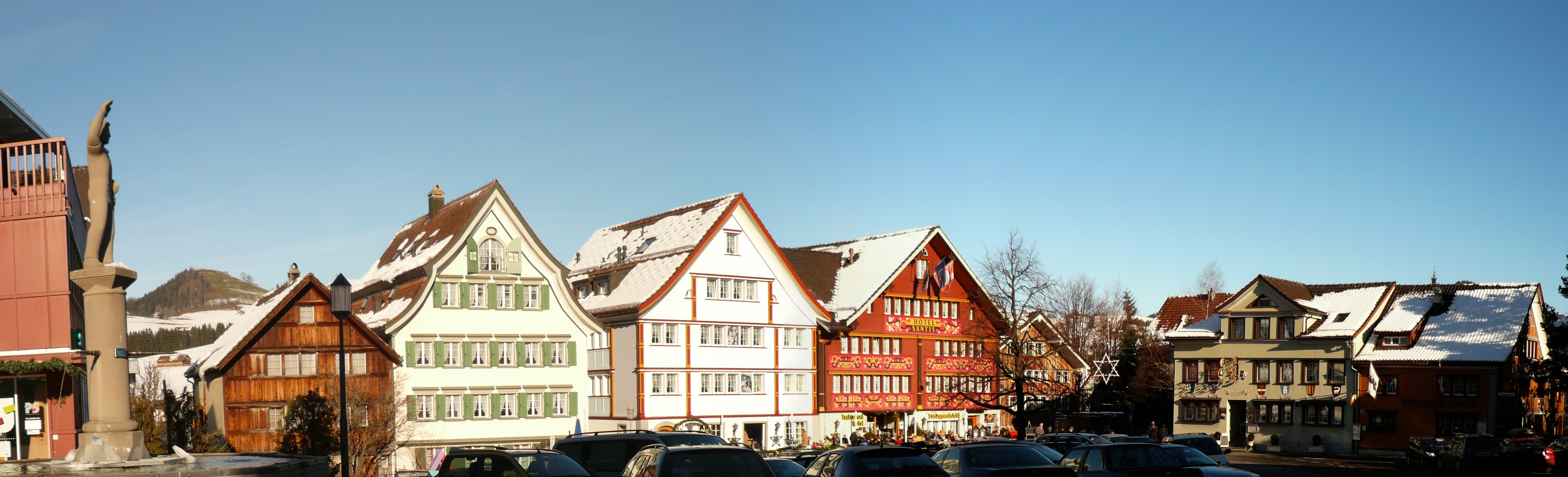 Central place in Appenzell